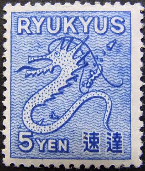 沖縄の琉球郵政が発行した速達切手。タツノオトシゴと沖縄地図が描かれている。